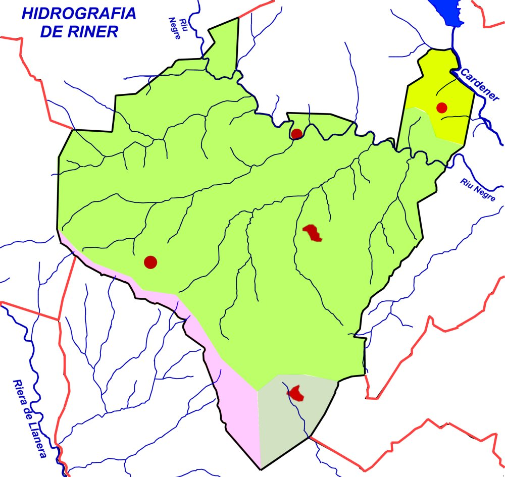 Mapa de les conques hidrogràfiques del municipi de Riner.